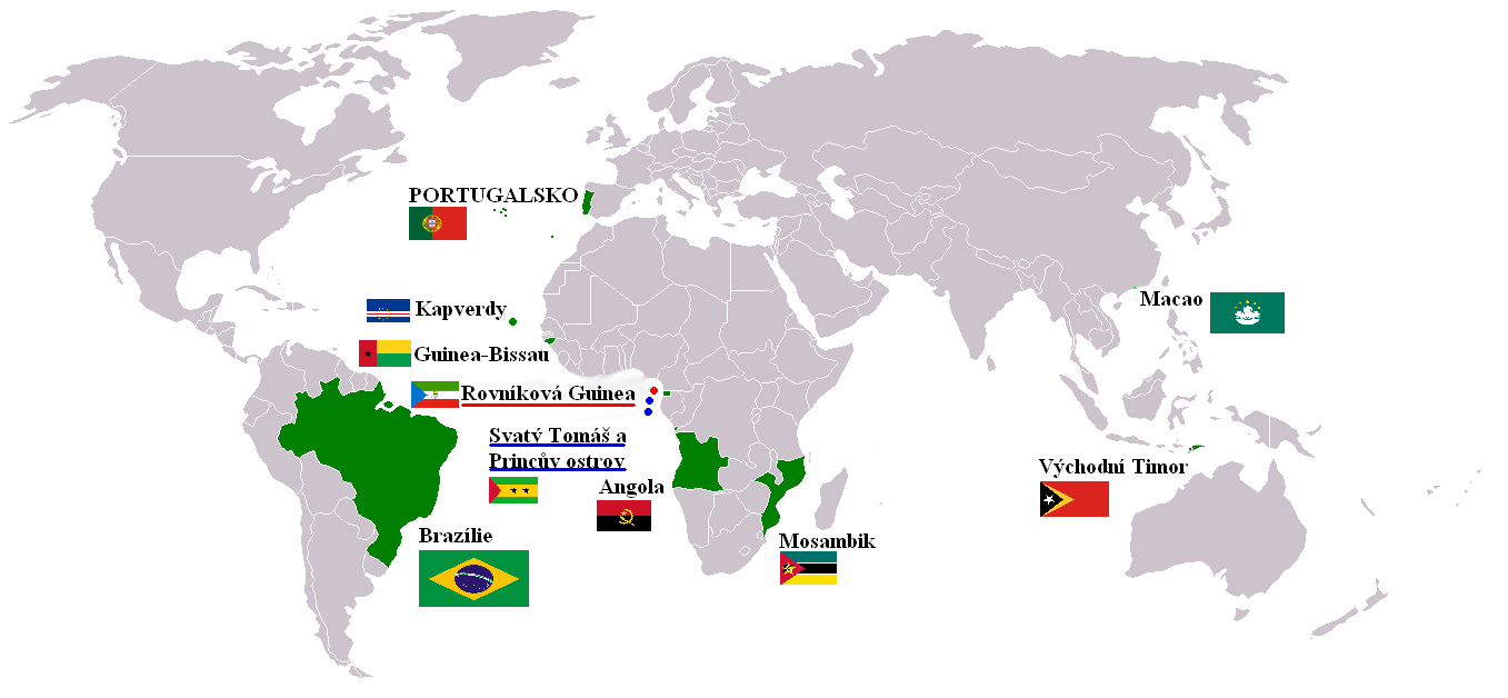 Česká verze tohoto souboru